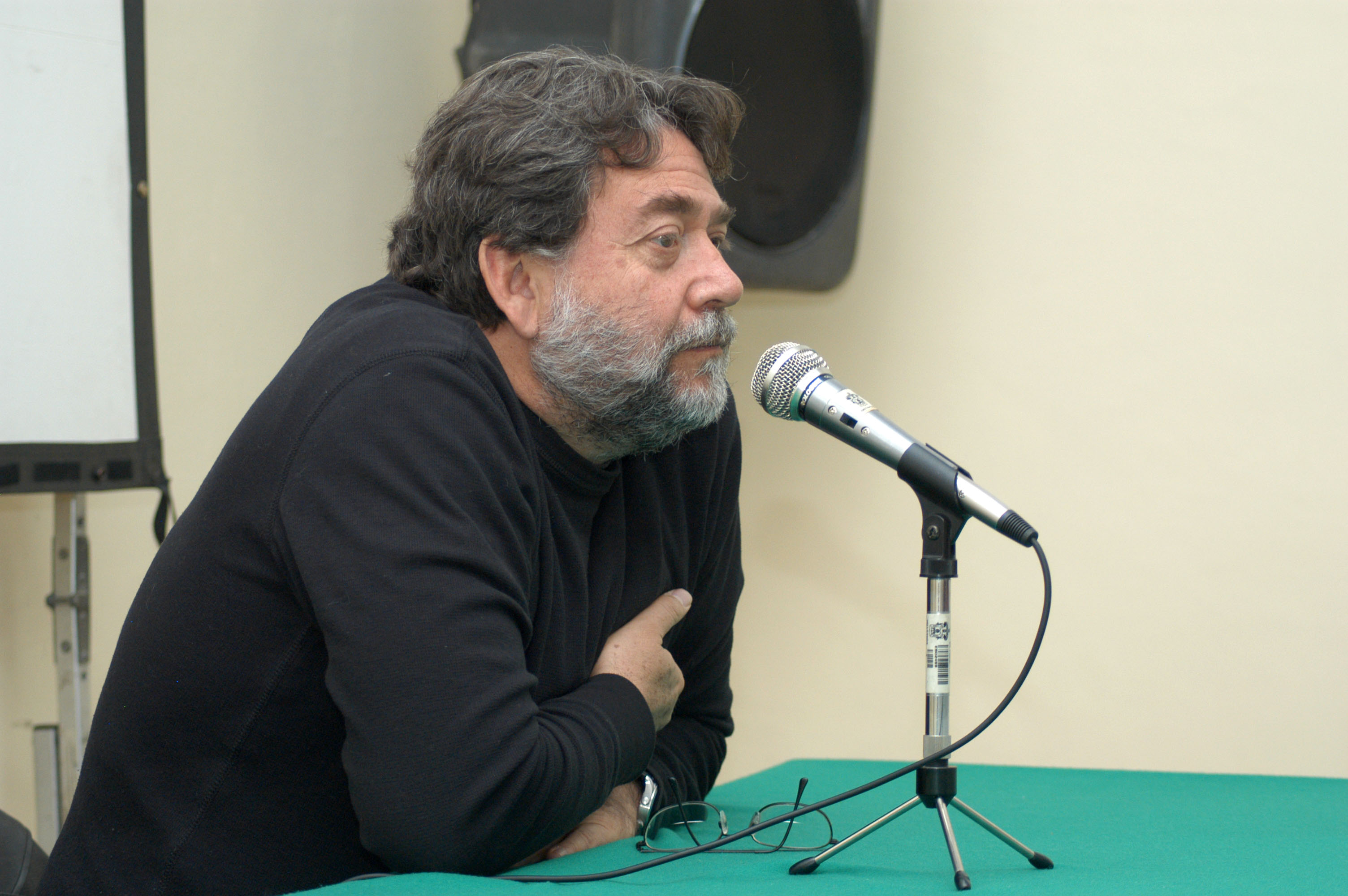 Guadalajara, Jalisco, 7 de marzo de 2008. Guillermo Navarro durante su charla Escribiendo con luz, realizada en la casa Zuno.